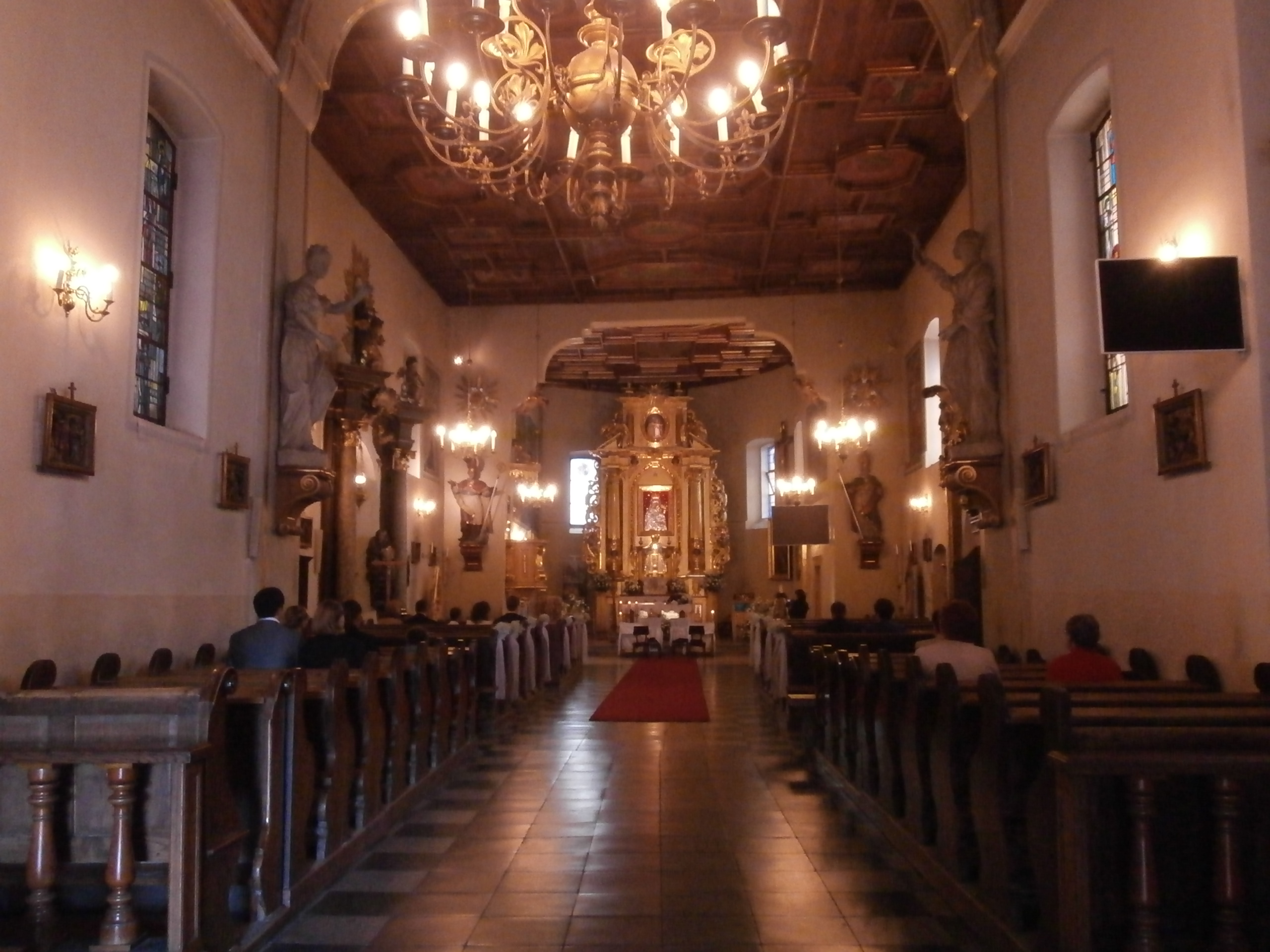 Wnętrze kościoła św. Mikołaja w Skale (miasto w Województwie Małopolskim).